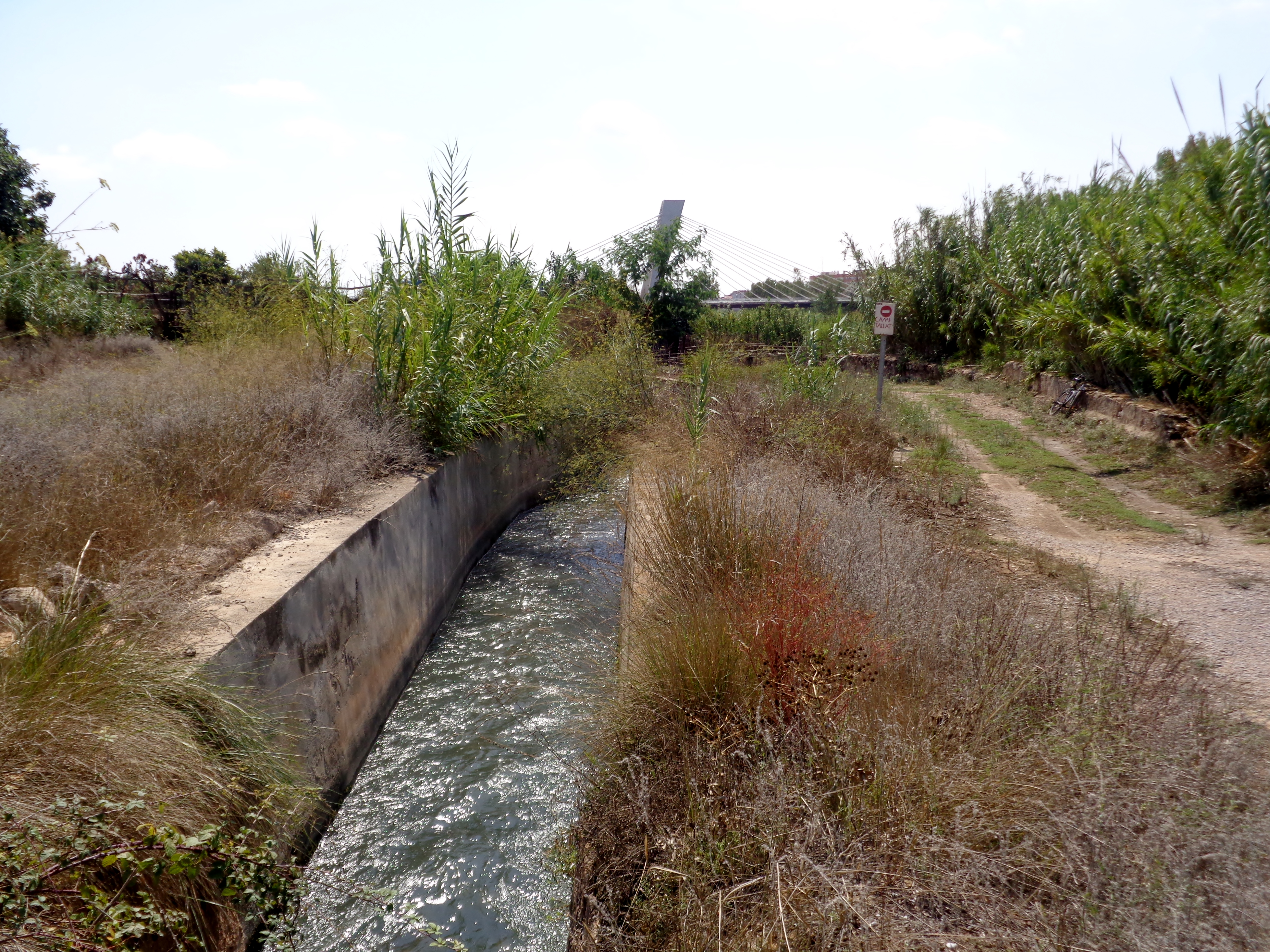 Molí del Vado. 14.190-050.